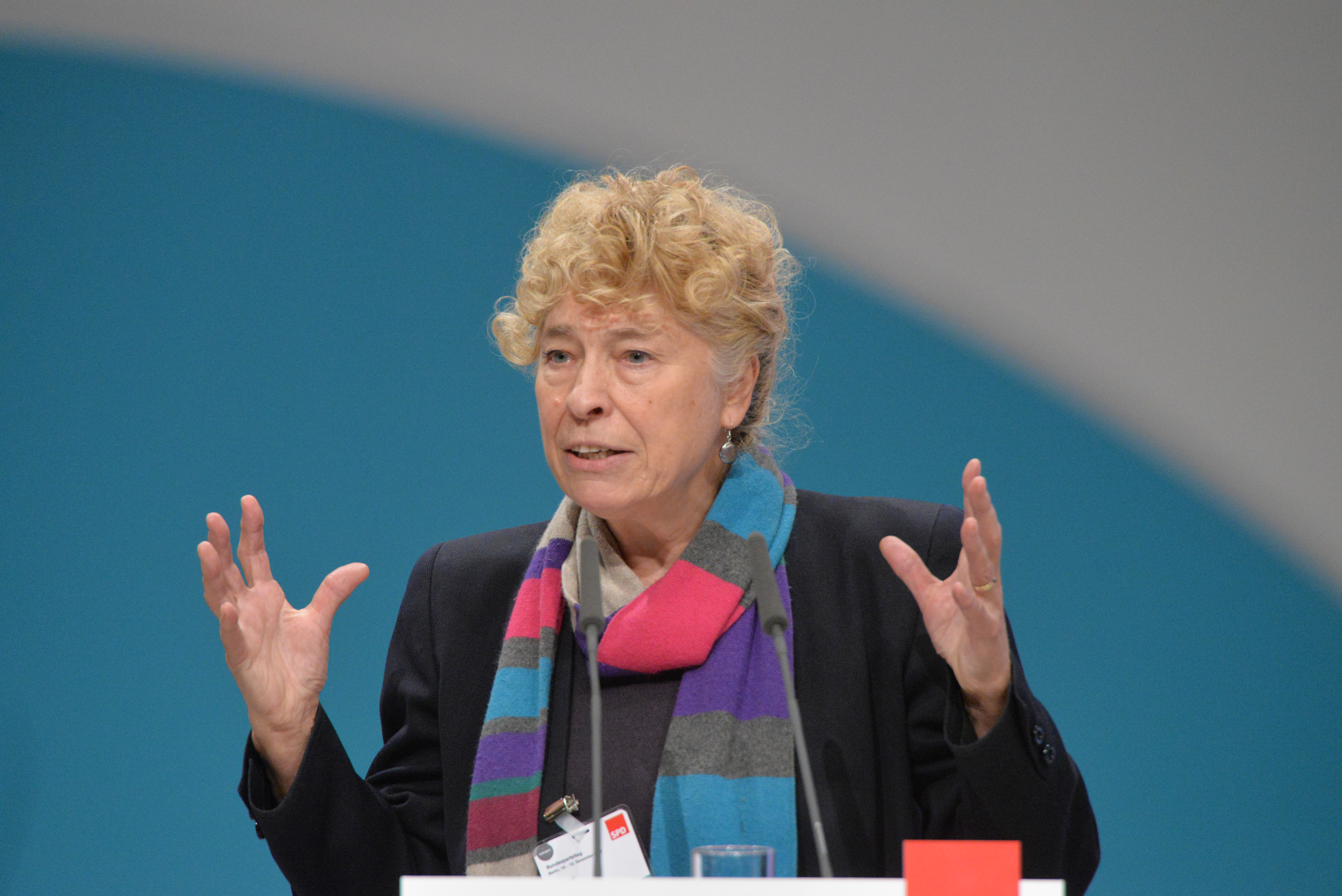 SPD Bundesparteitag Berlin, 10.-12. Dezember 2015, CityCube, Messe Berlin